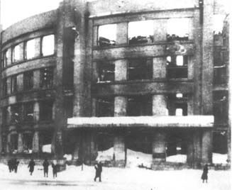 Здание ЮВЖД после войны